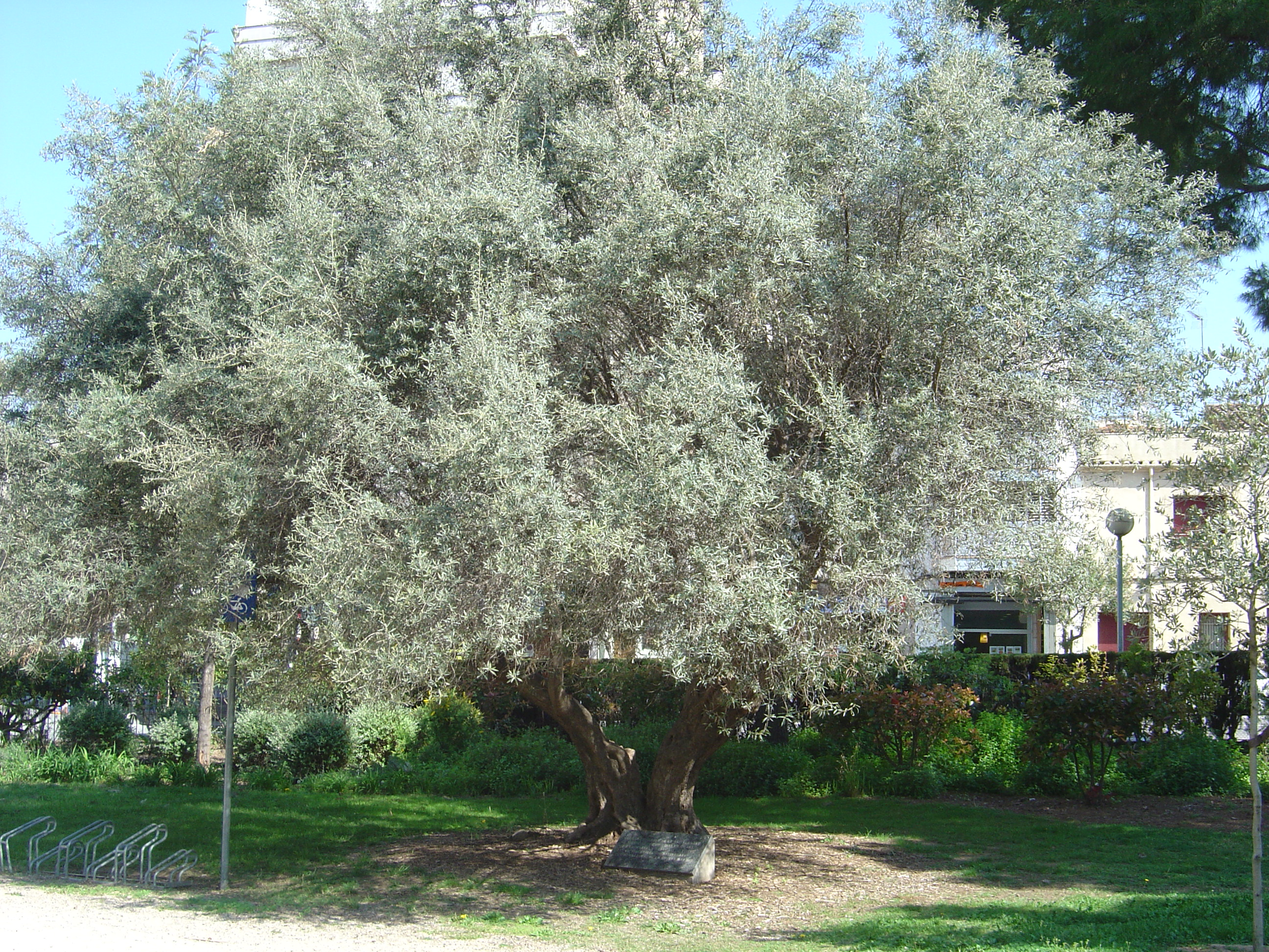 Olivera de la Pau al Parc Torras i Villà de Granollers. Arbre catalogat.